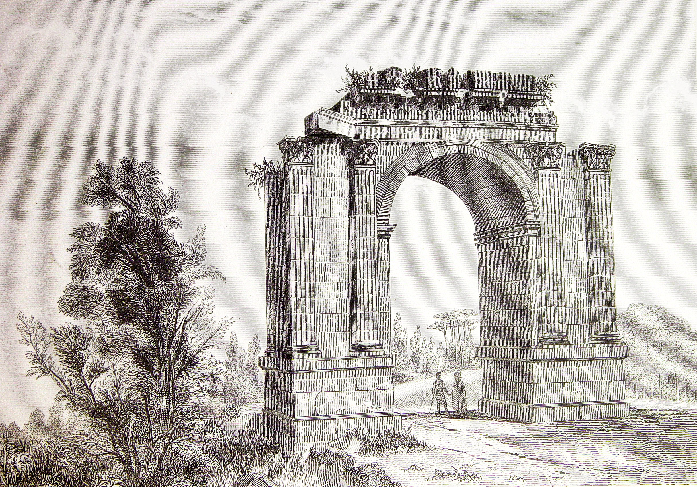 Ilustraciones pertenecientes al libro: Las glorias nacionales : grande historia universal de todos los reinos, provincias, islas y colonias de la Monarquía Española, desde los tiempos primitivos hasta el año de 1852. - Madrid [etc.] (Barcelona : Imprenta de Luis Tasso) Librería de la Publicidad [etc.], 1852-1854.